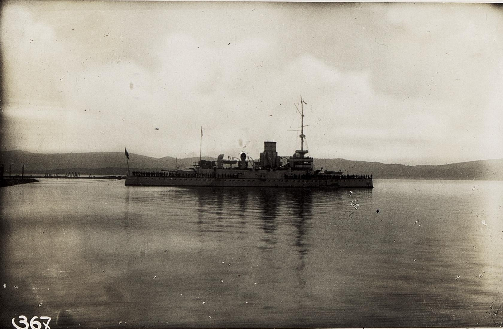 Kriegsschiff im Hafen von Theodo.